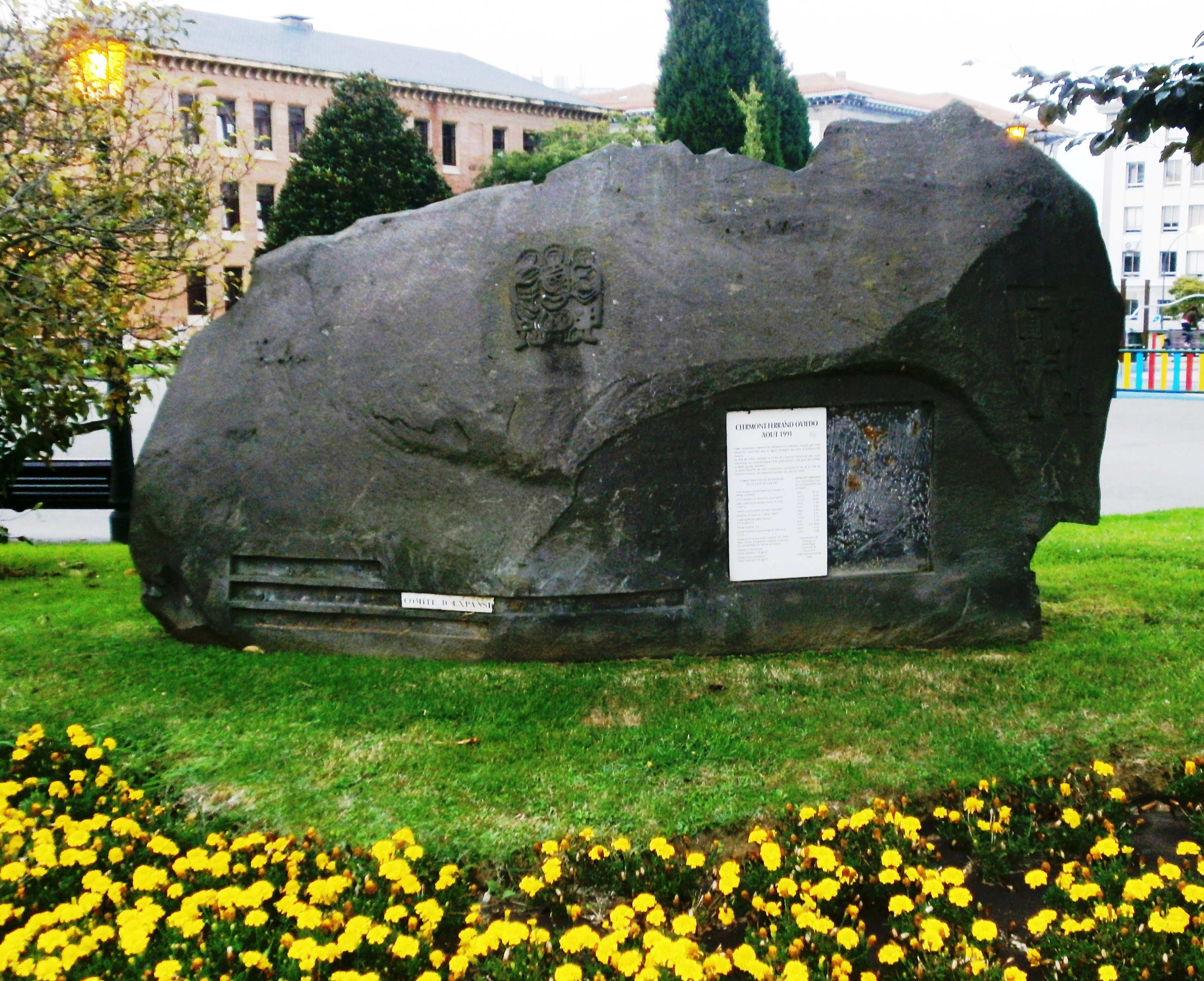 Esculturas en Oviedo al aire libre